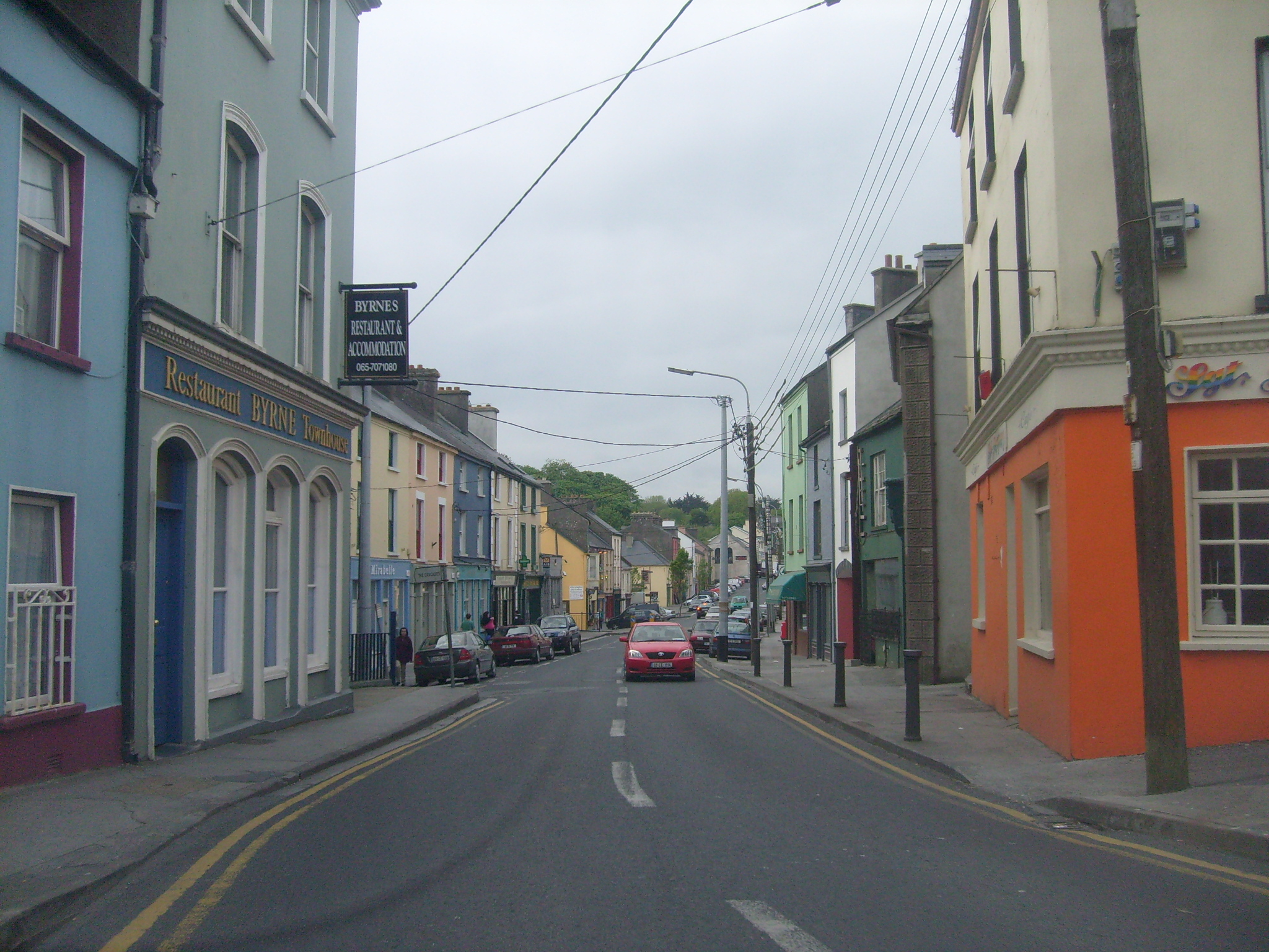 Ennistymon, Co Clare, Éire